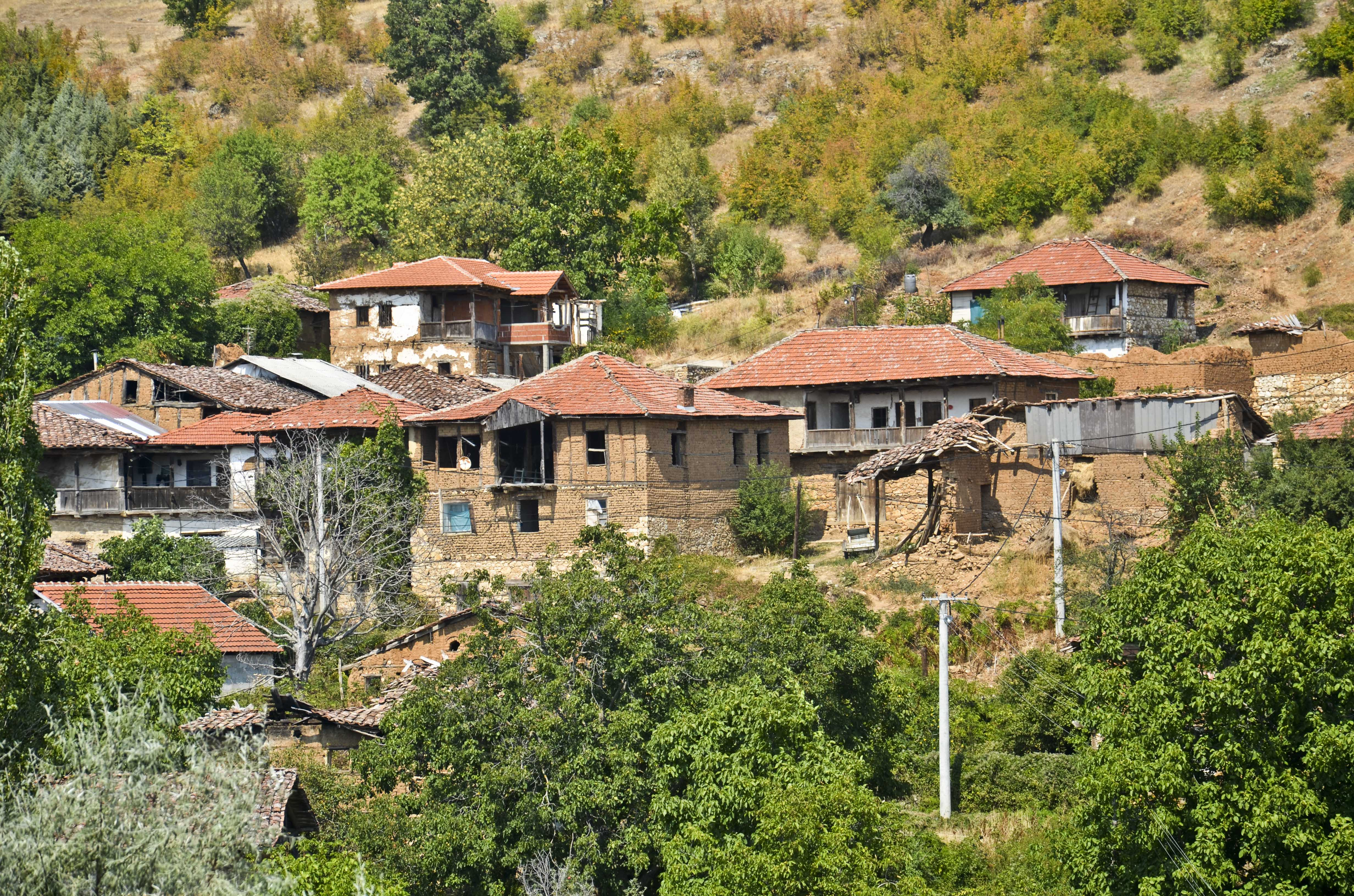 Село Горњани, скопско